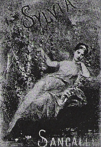 Sangalli edited